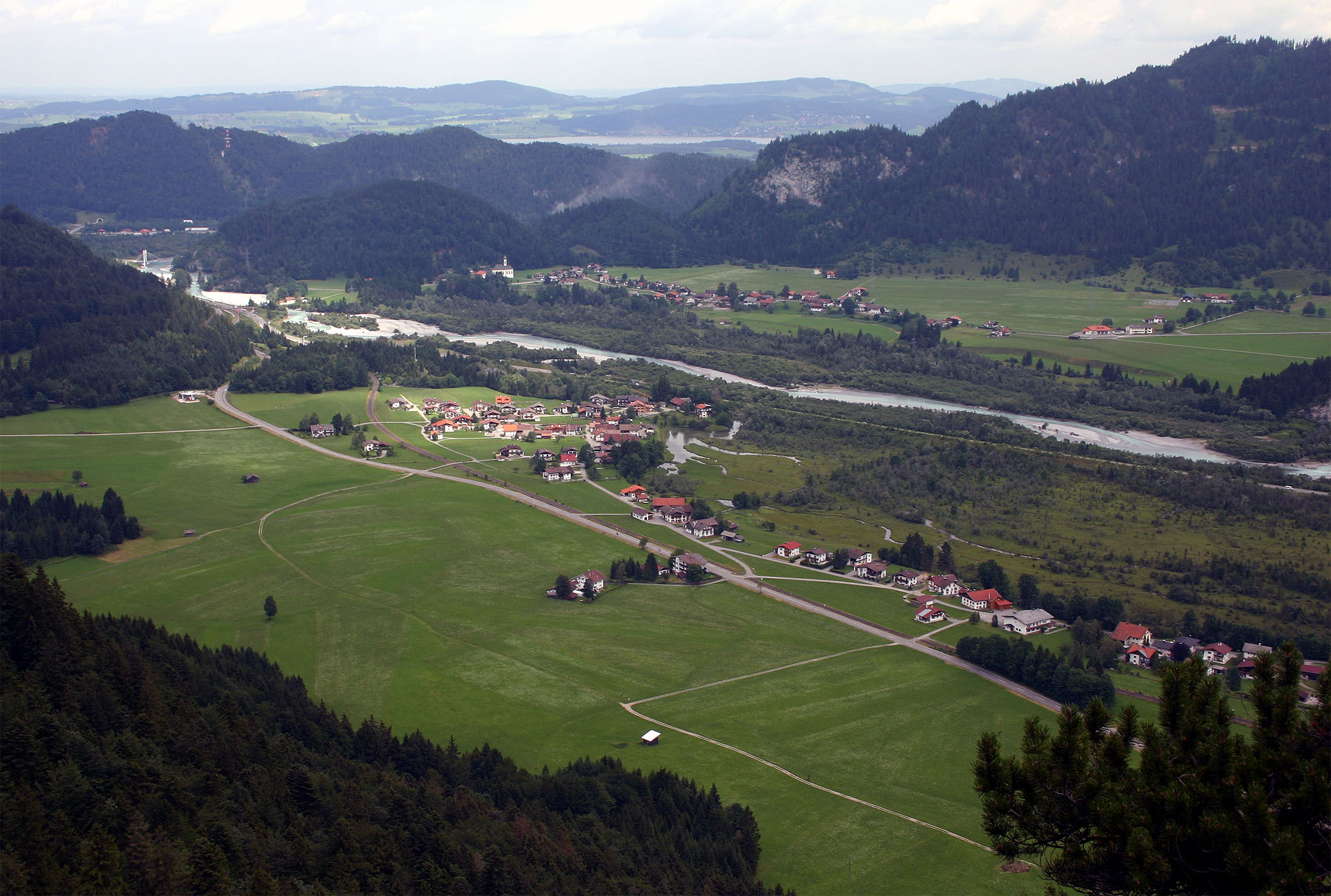 Musau (Tirol), gesehen von der "Achsel" (~ 1150 m), im Hintergrund hinter dem Fluss Lech die Ortschaft Unter-Pinswang